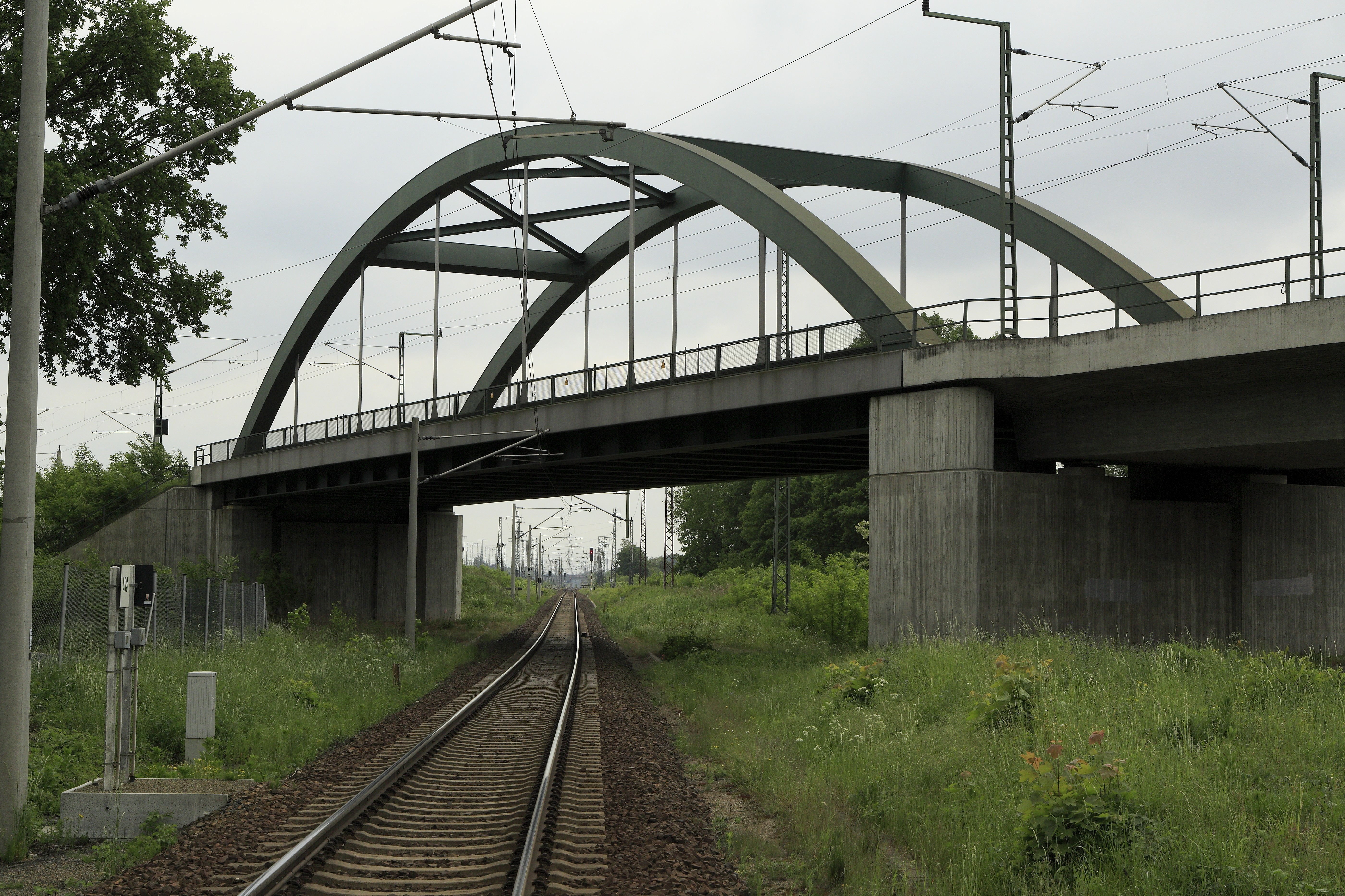 Strecke 6133 (Jüterbog–Röderau) Richtung Süden vom Wegübergang Lindenstraße, über das Kreuzungsbauwerk verläuft die Strecke 6207 Kohlfurt–Roßlau. Immerhin hat man beim Bau dieses Kreuzungsbauwerkes auf einen zweigleisigen Ausbau Rücksicht genommen.